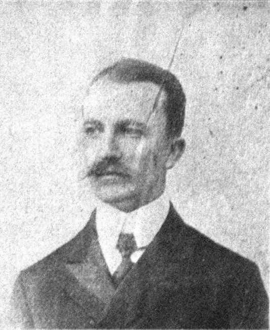 Österreichischer Politiker, Reichsratswahl 1907, Name siehe Dateiname